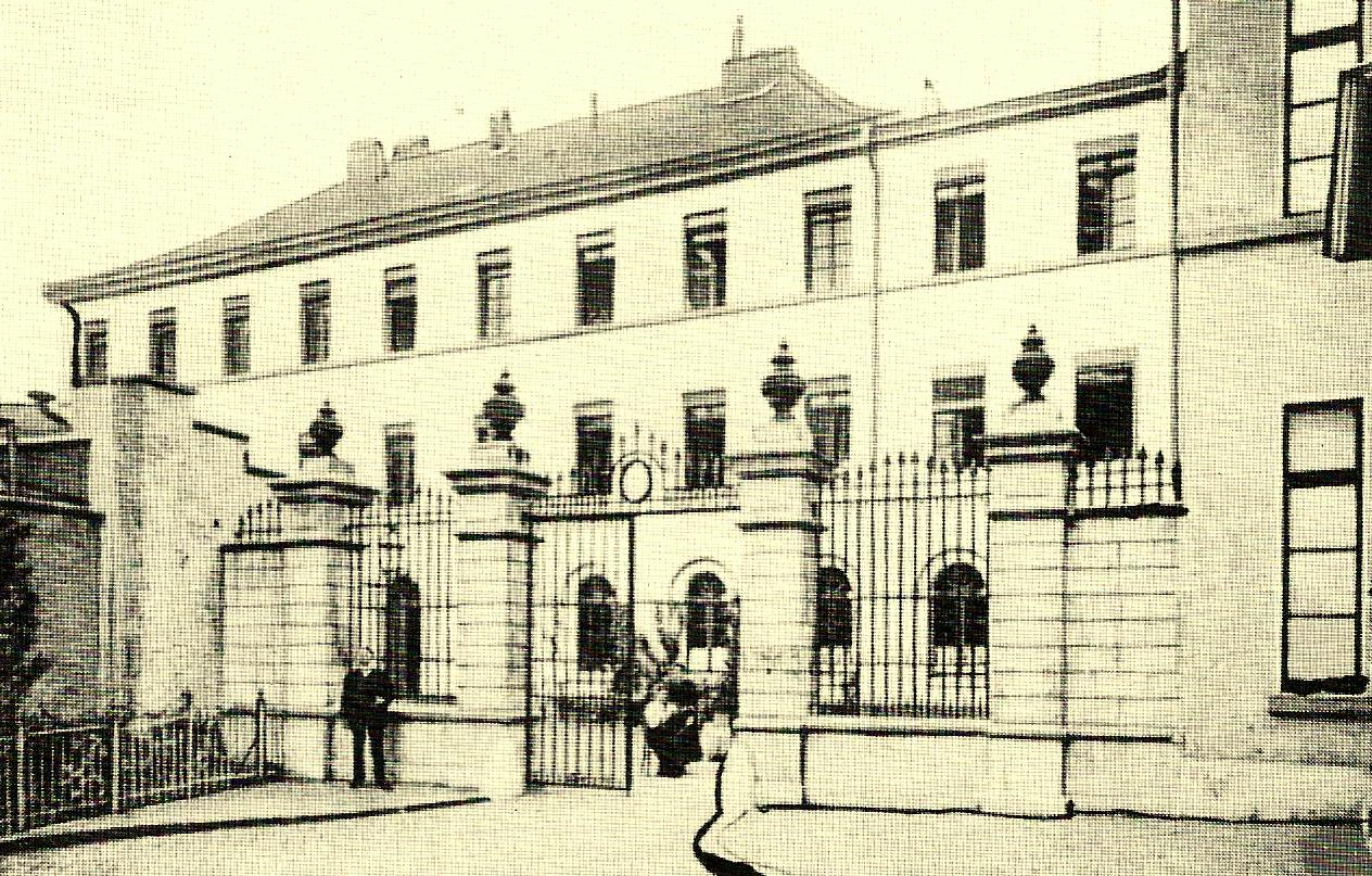 Ehemaliges Klostergebäude der Franziskaner-Minoriten von St. Nikolaus zu Aachen, umgewidmet als Gefängnis und Landgericht (bis 1874), anschließend Verwaltungs- und ab 1902 Schulgebäude